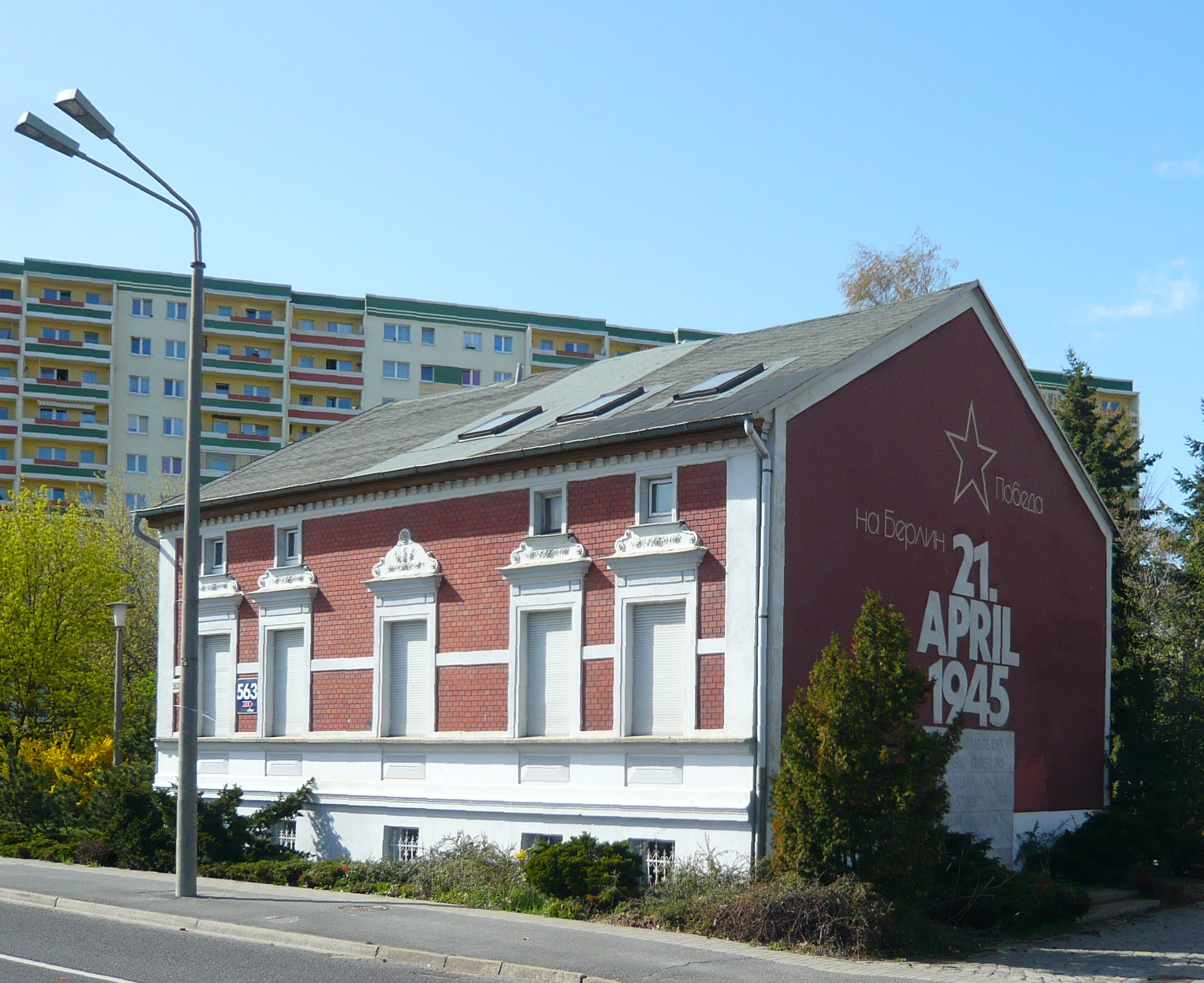 Ortsteil Marzahn: Landsberger Allee Nummer 563: Baudenkmal/ Denkmal